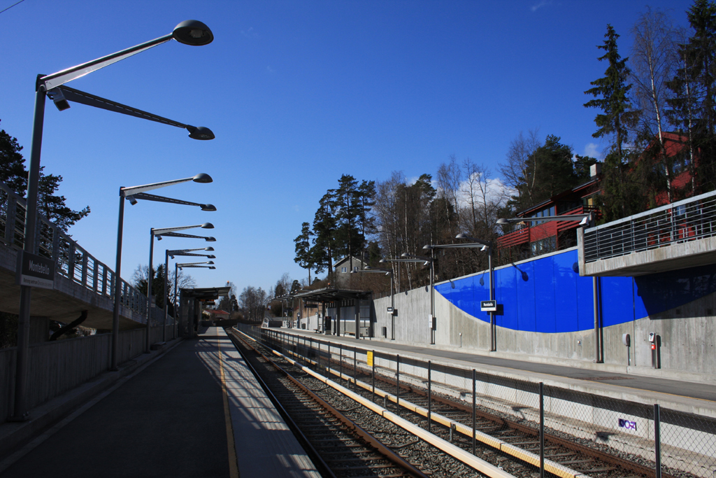 Montebello T-banestasjon sett fra Spor 1. I retning mot Ullernåsen.